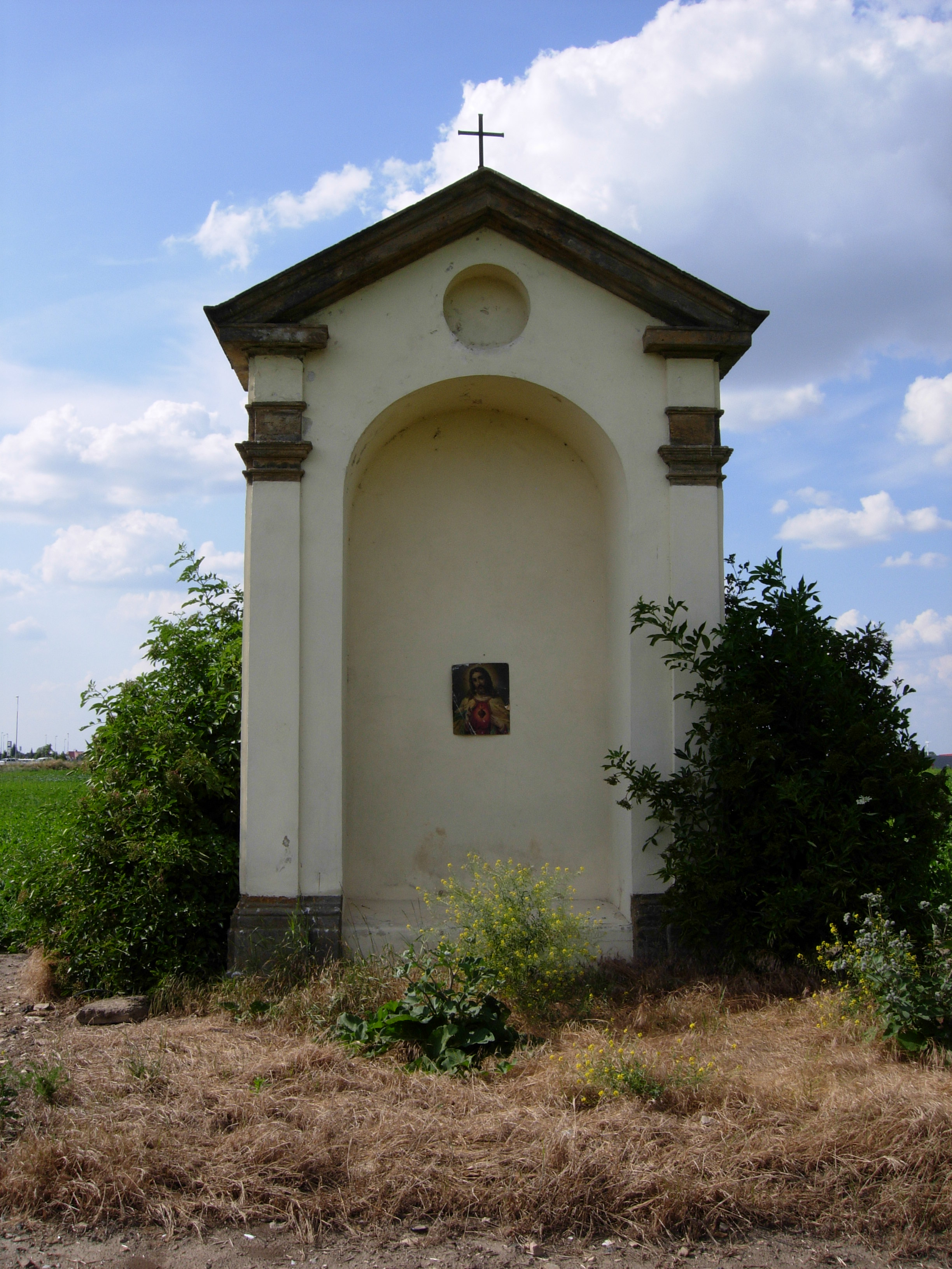 Výklenková Jeníkovská kaple Staroboleslavské cesty v poli východně od Beladovy ulice ve Vysočanech, bezprostředně u hranice Letňan, asi 300 metrů jihovýchodně od stanice metra Letňany.